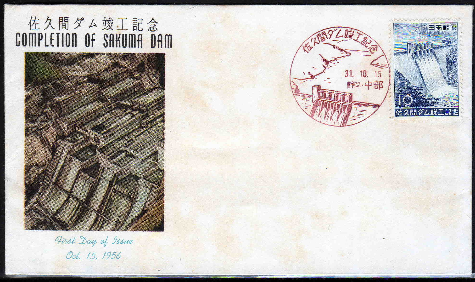 佐久間ダム竣工記念切手の切手普及会製作の初日カバー。はっこうから半世紀が経過しており、著作権切れ。